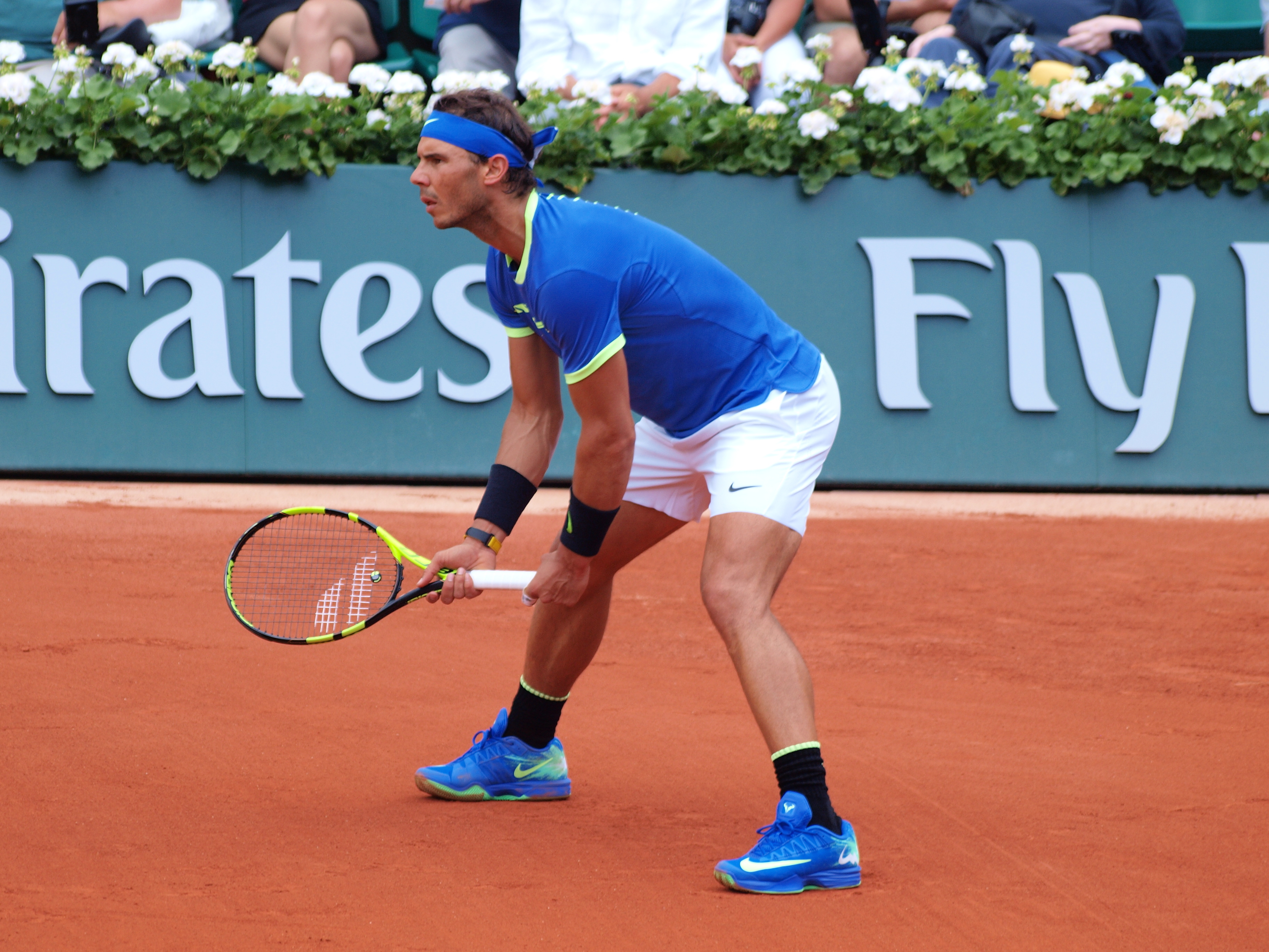 Rafael Nadal lors des Internationaux de France de Tennis au stade Roland Garros de Paris, le 2 juin 2017, durant le match contre Nikoloz Basilashvili.